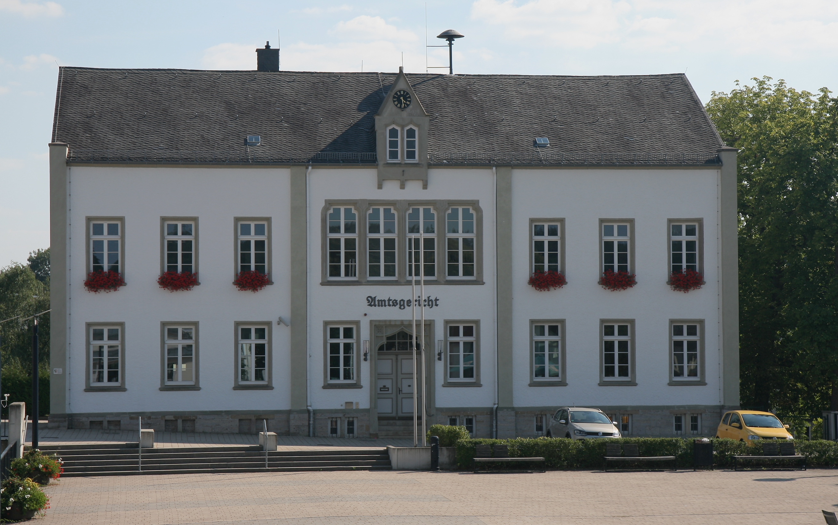 Amtsgericht Medebach, Marktstraße 2 in Medebach. This image shows a heritage building in Germany, located in the North Rhine-Westphalian city Medebach (no. 3).